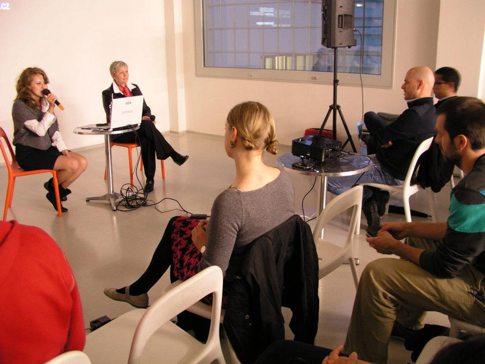 Design Interview